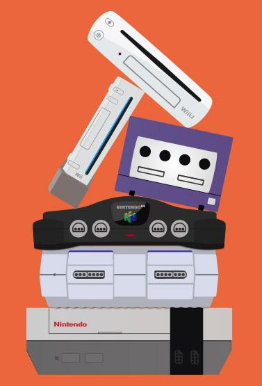 Tutte le console di Nintendo (inclusa la Wii U)